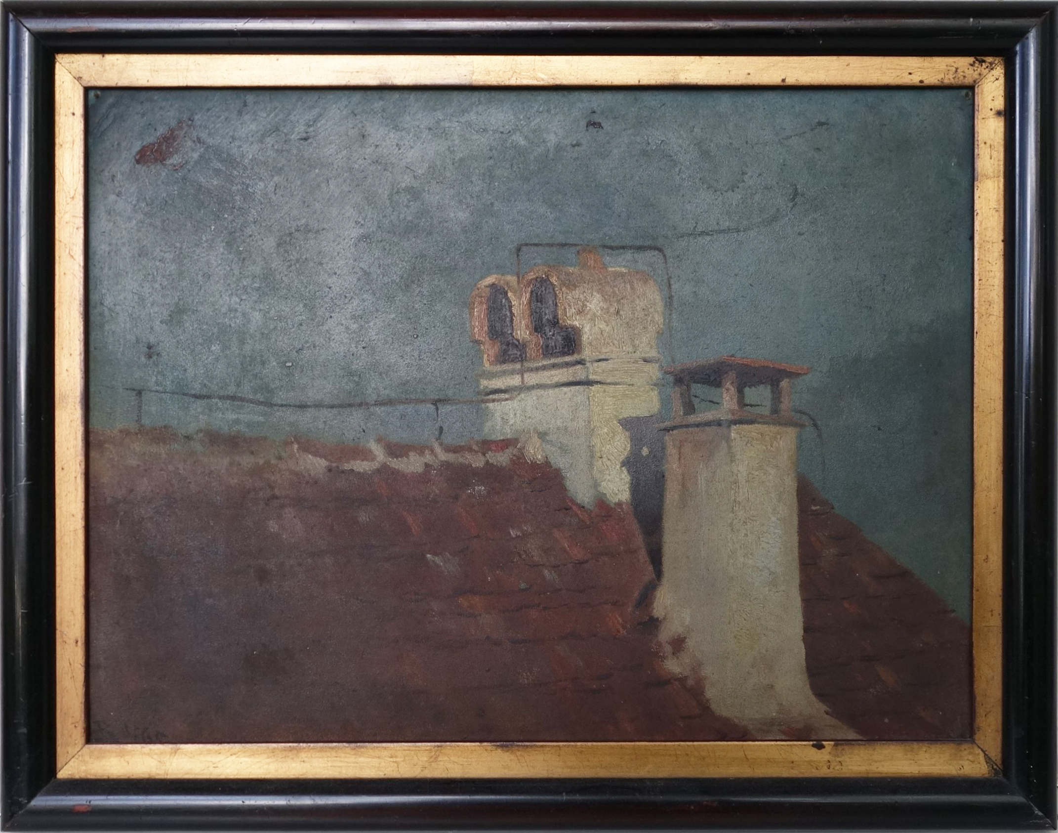 Ernst Otto Reiniger (1841-1873): Dachlandschaft. Sign. und dat. "ER 1865", Ölkizze auf Karton, 30x38 cm (mit Rahmen). Privatbesitz